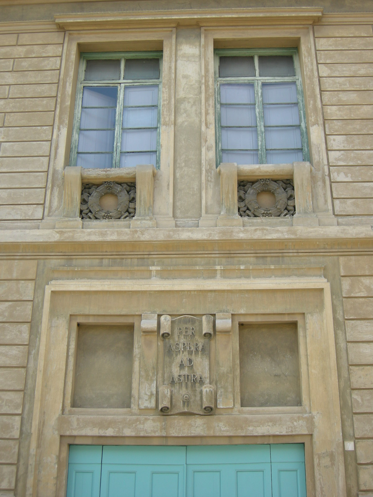 Galleria rinaldo carnielo 14 porta lato